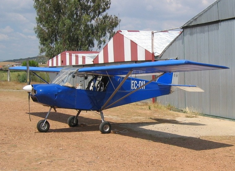 Skyranger